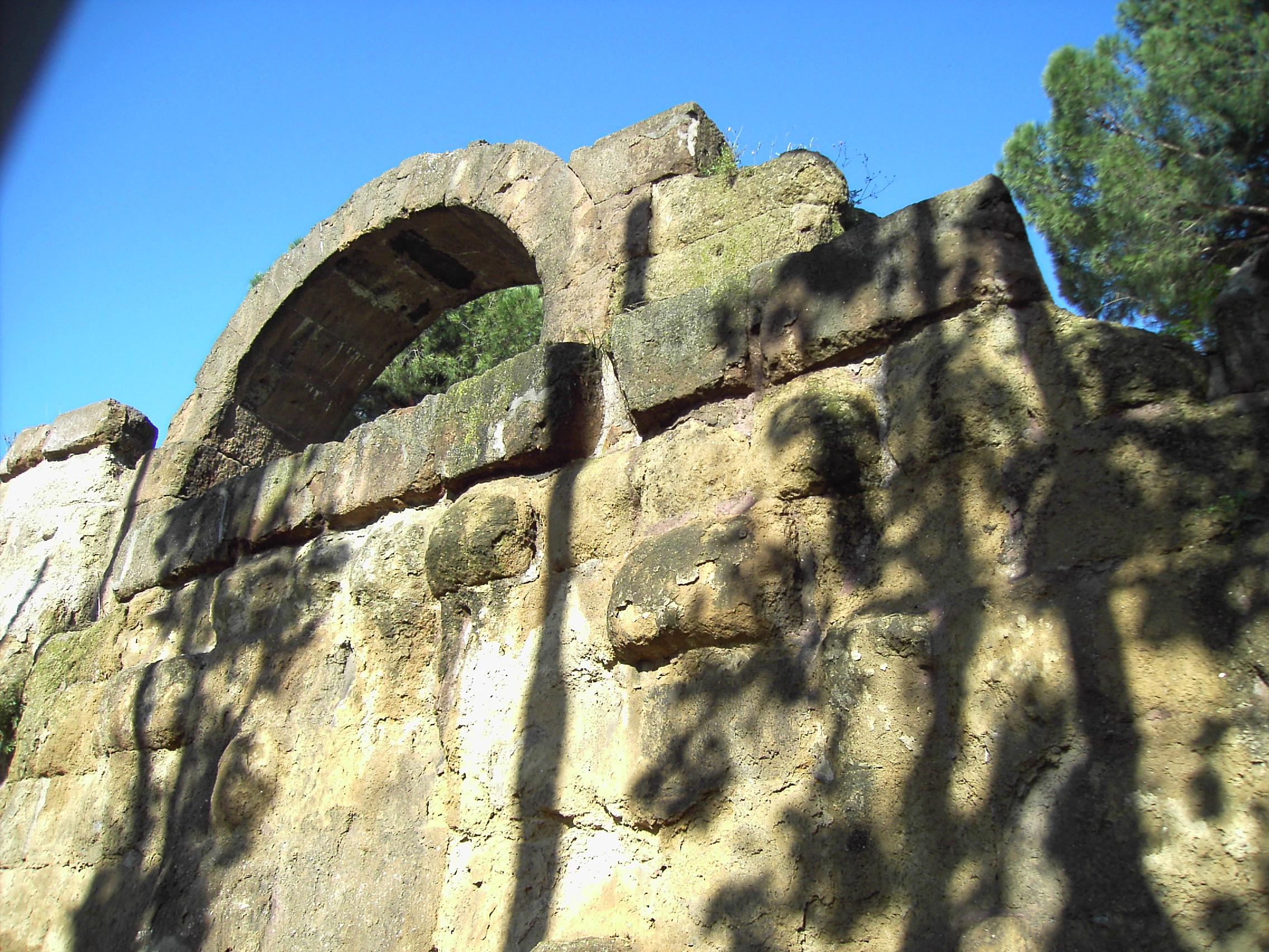 Roma, mura serviane all'Aventino